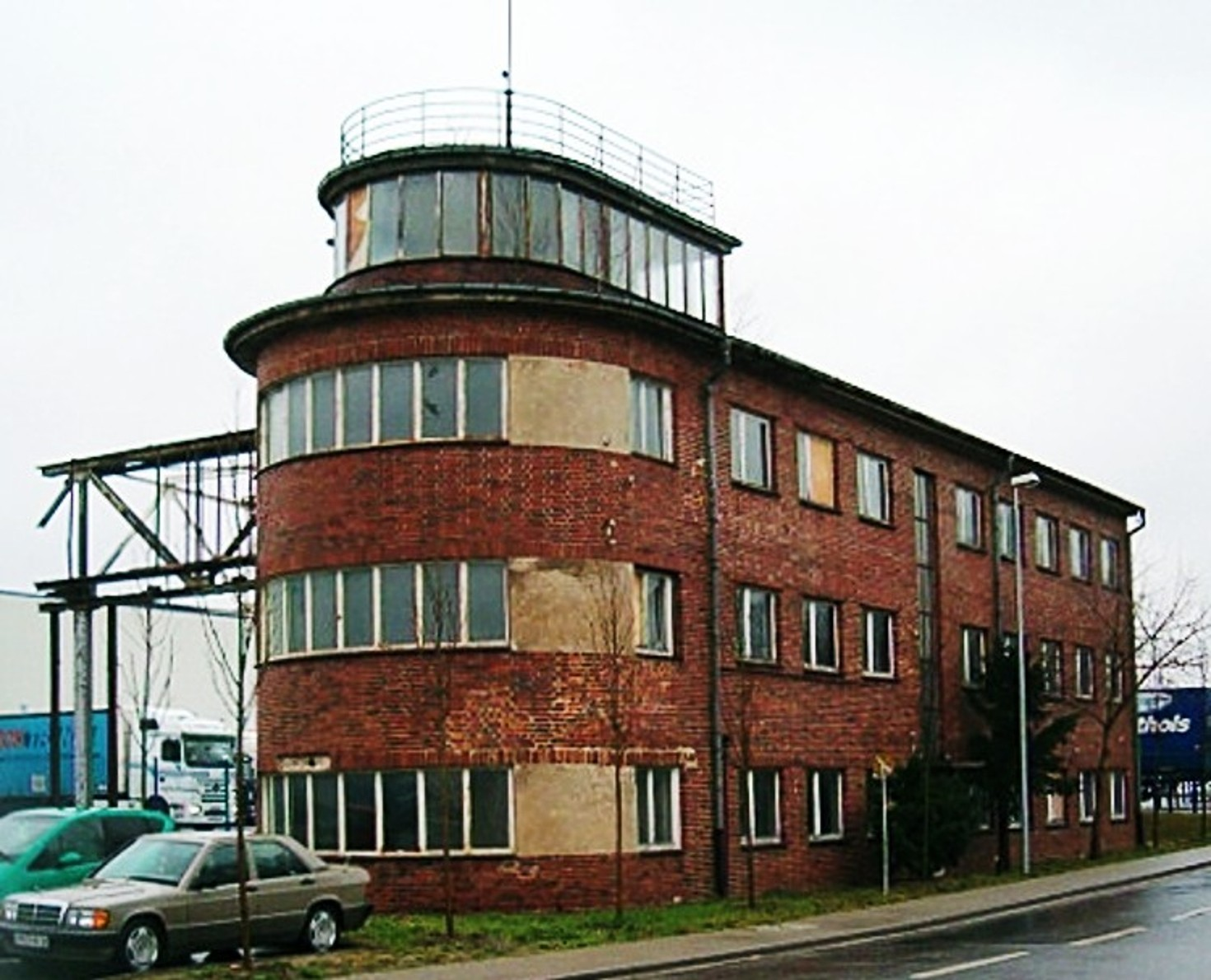 Flugplatz Staaken mit Flugzentrale